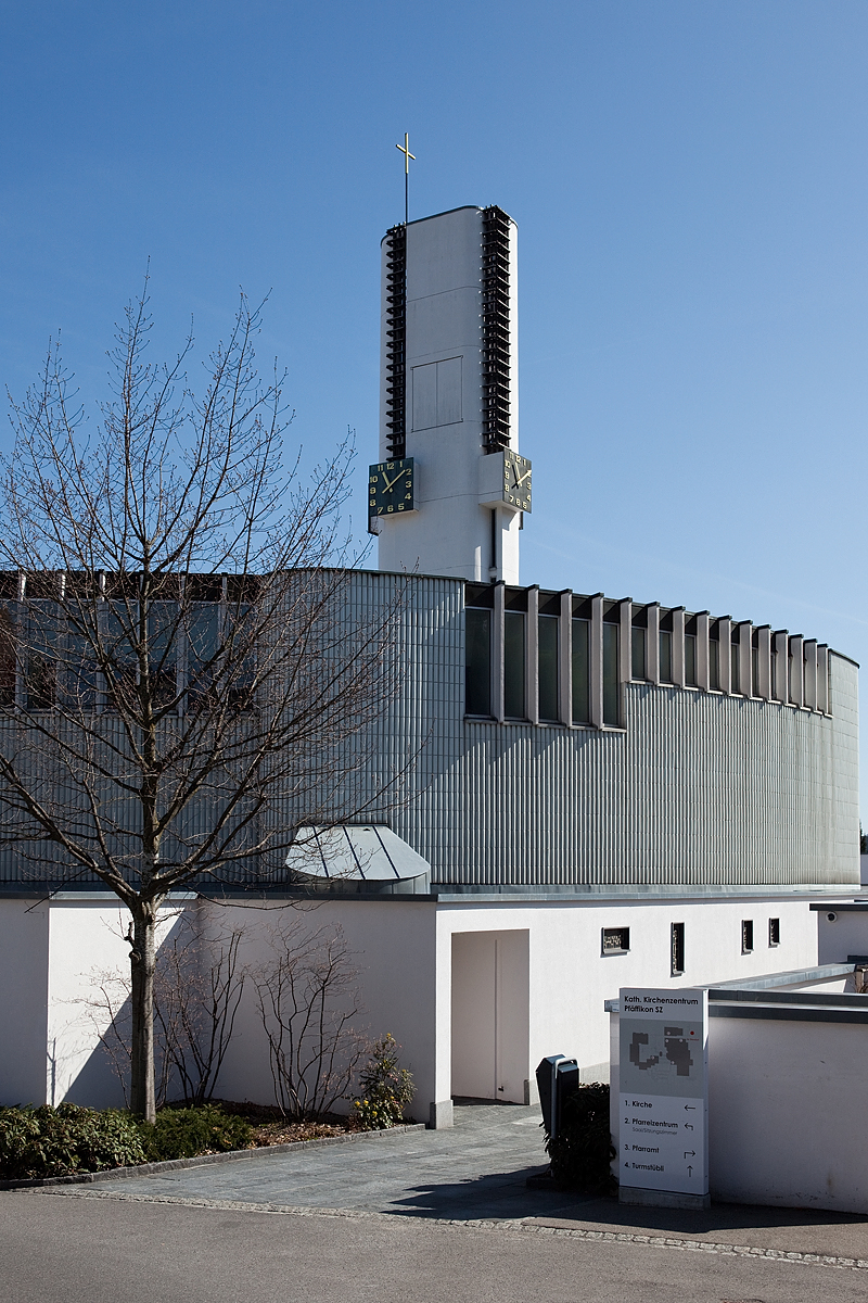 Katholische Kirche St. Meinrad in Pfäffikon (SZ), Gemeinde Freienbach